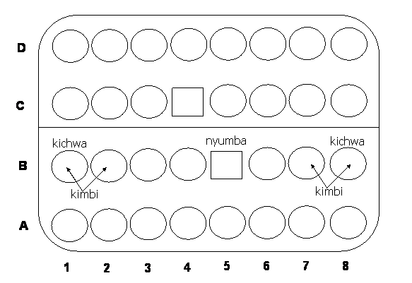 Tavoliere del Bao, rifatto da me